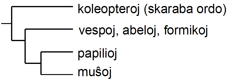 Ekzemplo pri kladogramo.